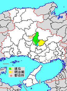 兵庫県多可郡の範囲